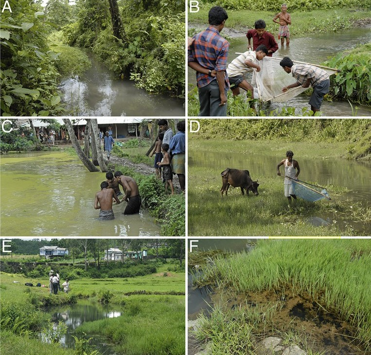 Habitat alami ikan zebra